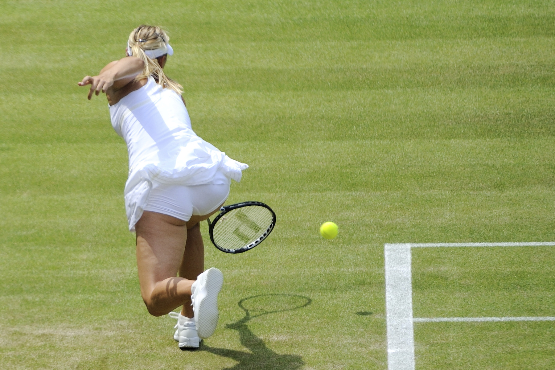 Maria Sharapova – Wimbledon 2009